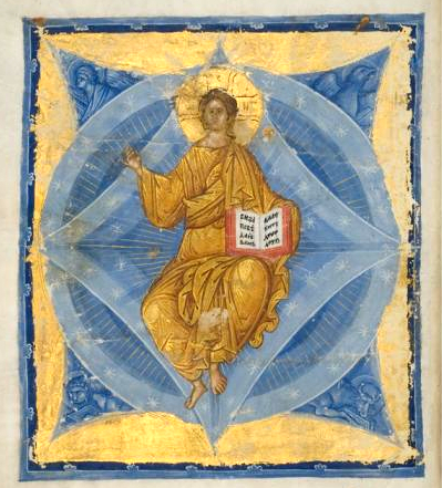 АНДРОНИКОВО ЕВАНГЕЛИЕ Начало XV века Москва Пергамен; чернила, темпера, киноварь, золото; переплет – дерево, кожа, металл; литье 28,5 х 21,5 х 8 Поступило в 1921 году Происходит из Спасо-Андроникова монастыря. В середине XIX века было передано в Епархиальную библиотеку Реставрировано в 2000–2009 годах в ВХНРЦ им. И.Э. Грабаря ГИМ инв. 76013, ОР Епарх. 436